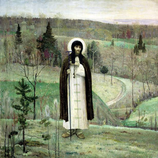 Михаил Нестеров. Преподобный Сергий Радонежский